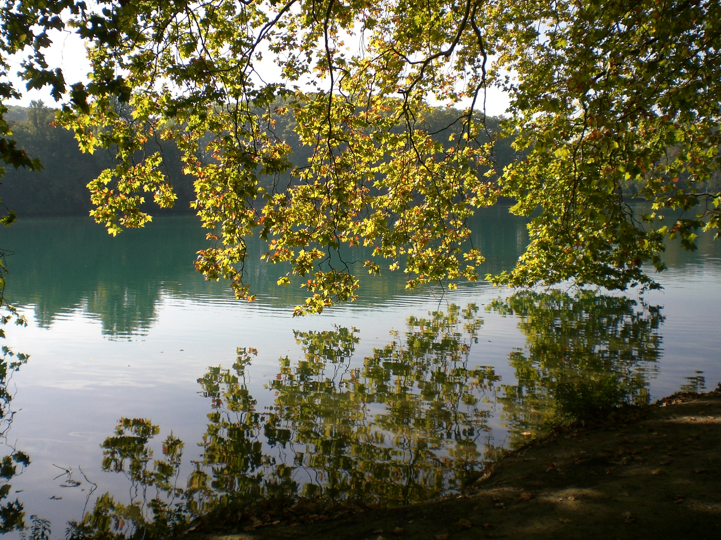 Prise de vue du lac du Parc de la Tête d'Or à partir d'un espace ombragé par un arbre important disposant d'un feuillage en bordure d'eau.